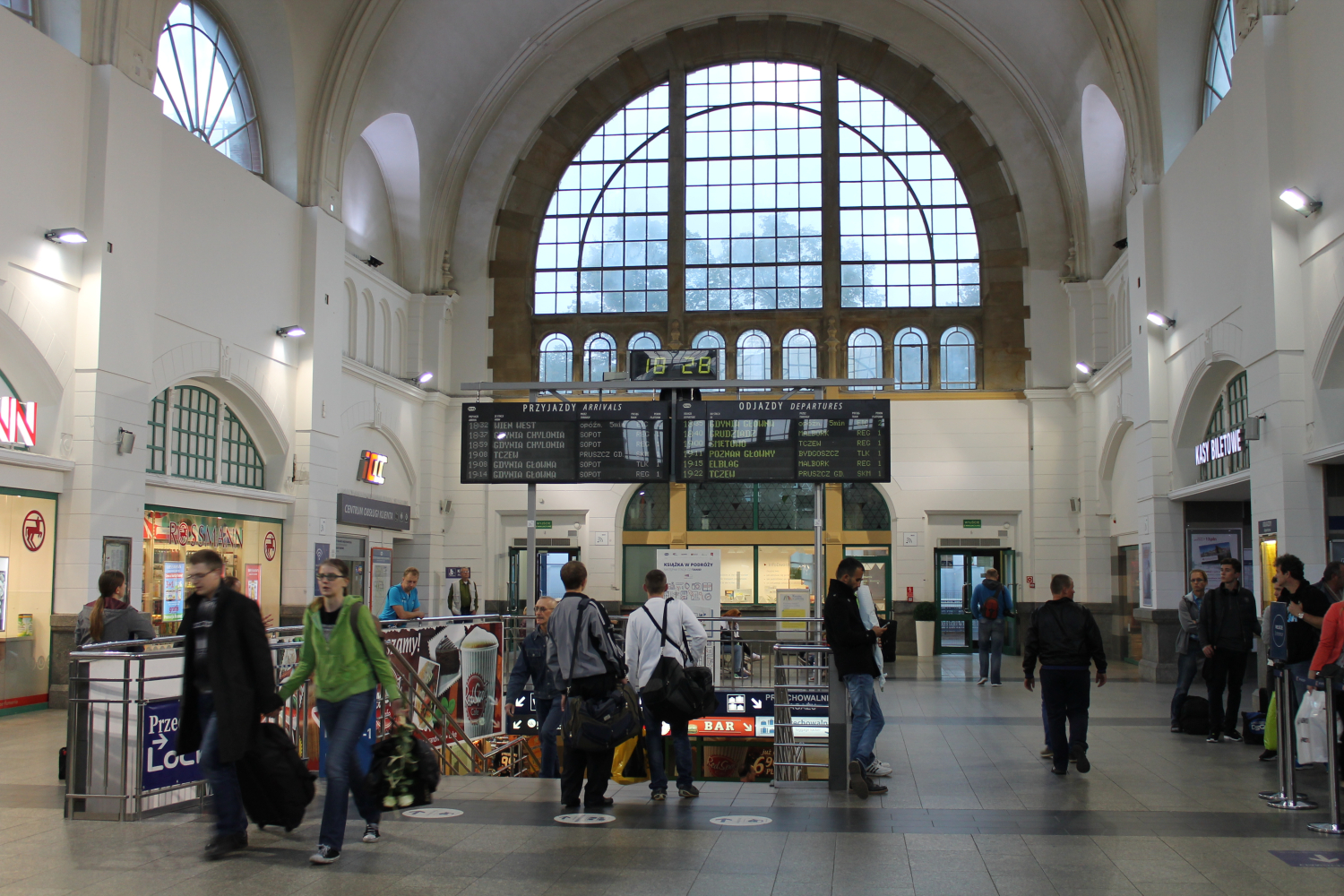 Wnętrze dworca Gdańsk Główny. The making of this document was supported by Wikimedia Polska Association, within Wikigrant no. WG 2015-34. English | polski | +/−